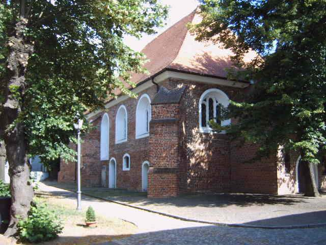 Wendisch-Deutsche Doppelkirche in Vetschau, Land Brandenburg, Deutschland deutsche Kirche Bild aufgenommen am 26.6.2006 von Olaf Meister